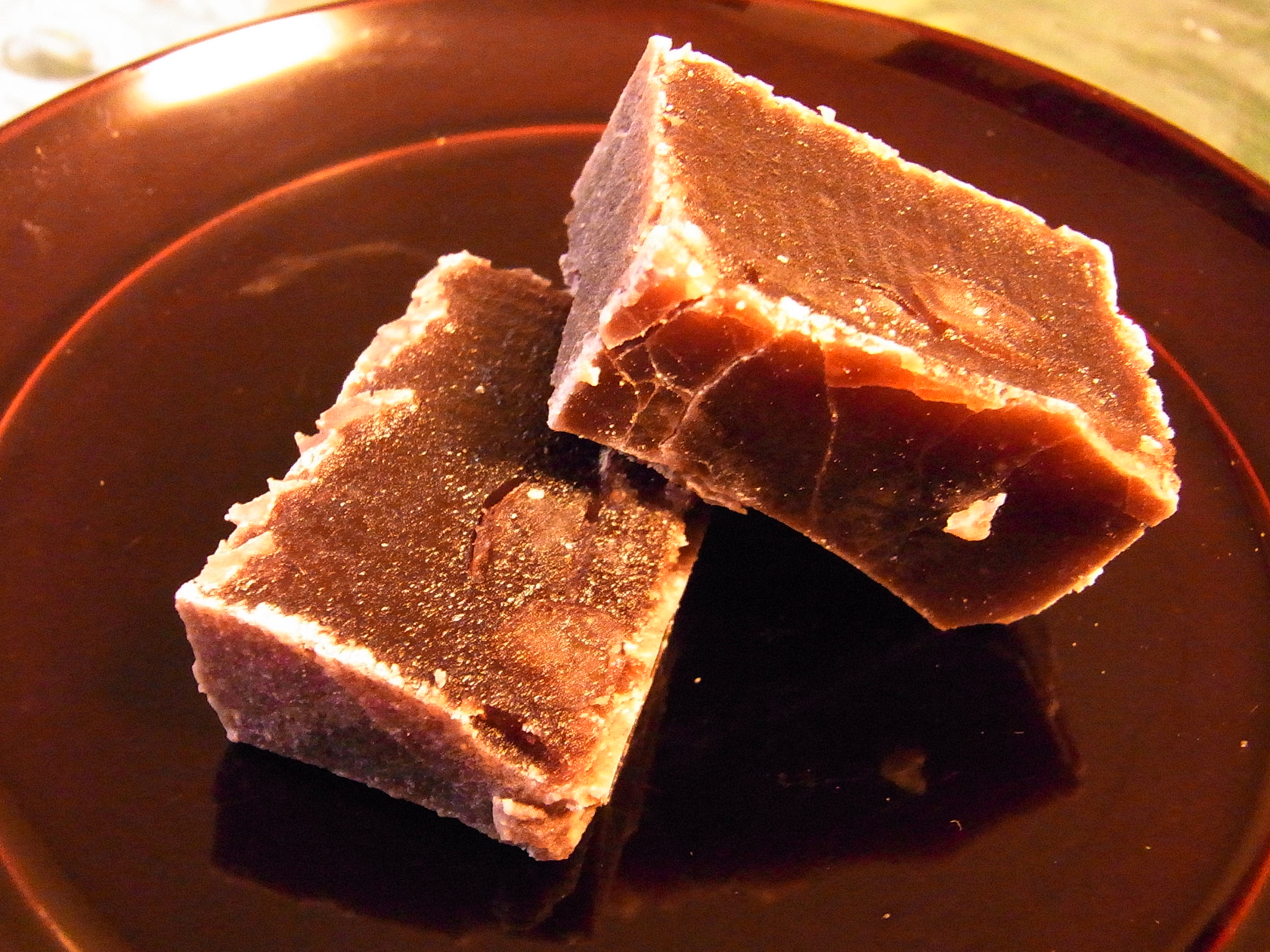 佐賀 村岡総本舗